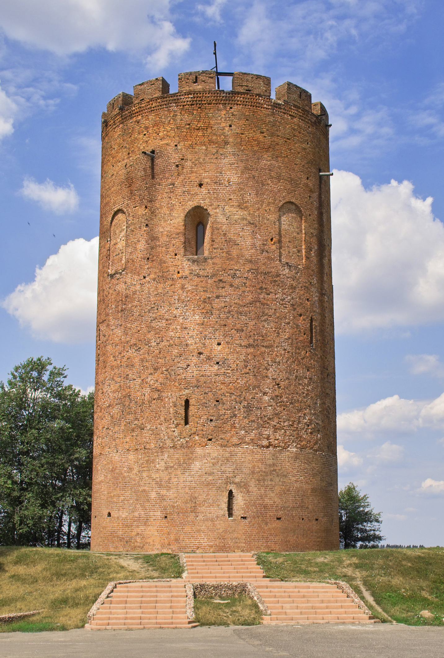 Беларуская (тарашкевіца): Камянецкая вежа. г. Камянец This is a photo of Belarusian heritage monument. Reference number: 110Г000321 ( WLM)